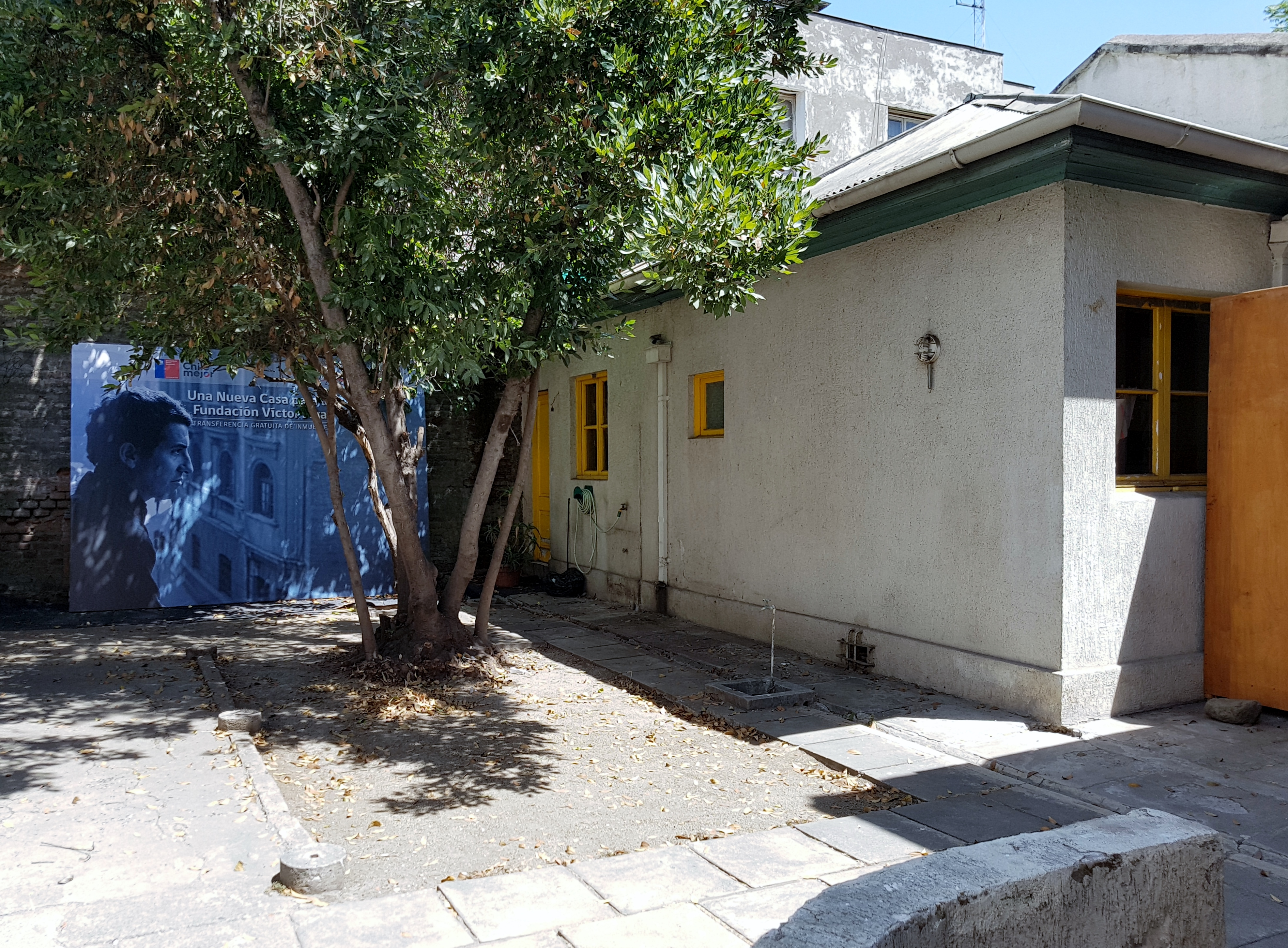 Sede de la Fundación Víctor Jara, calle Almirante Riveros 067, entre las avenidas Bustamante y Vicuña Mackenna; comuna de Providencia, Santiago de Chile. En la foto, el ala destinada a los archivos.